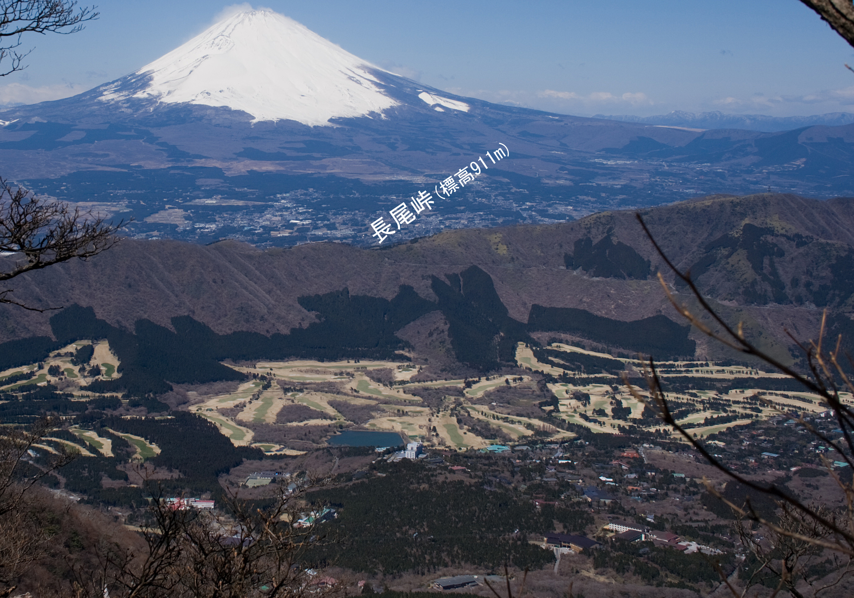 神山付近から望む富士山と箱根山外輪山